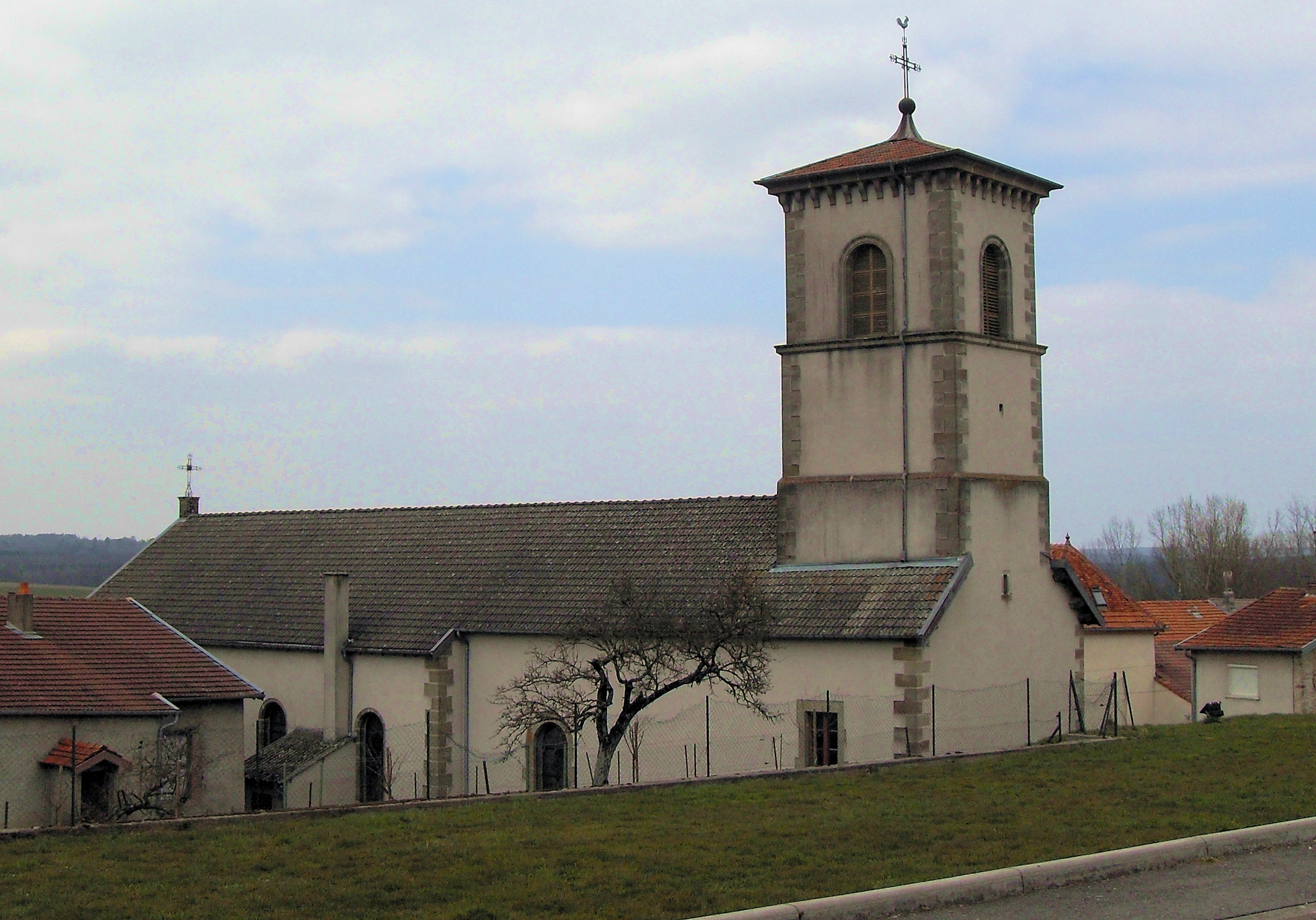 L'église Saint-Roch à Regnévelle